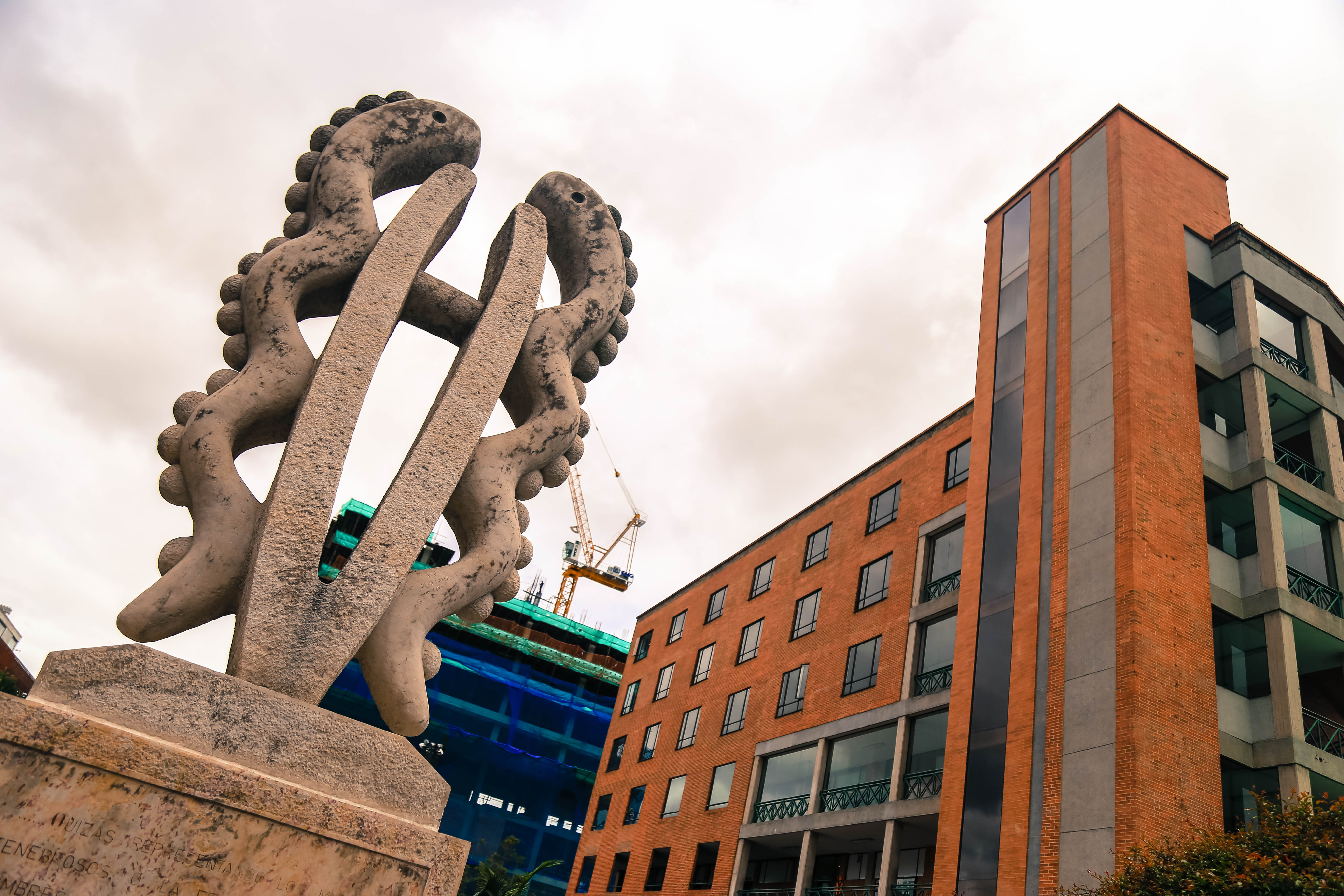 Escultura del símbolo de la Universidad El Bosque